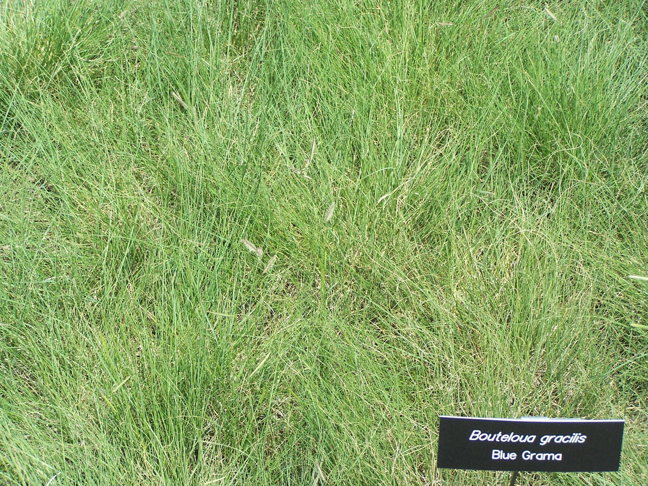 Blue grama. Bouteloua gracilis at Minnesota Landscape Arboretum